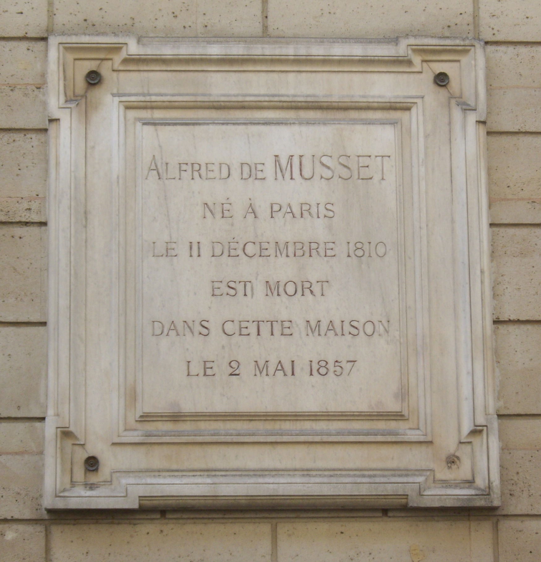 Plaque apposée au n° 6 de la rue du Mont-Thabor, Paris 1er, où vécut Alfred de Musset (1810-1857) de 1852 à sa mort le 2 mai 1857.